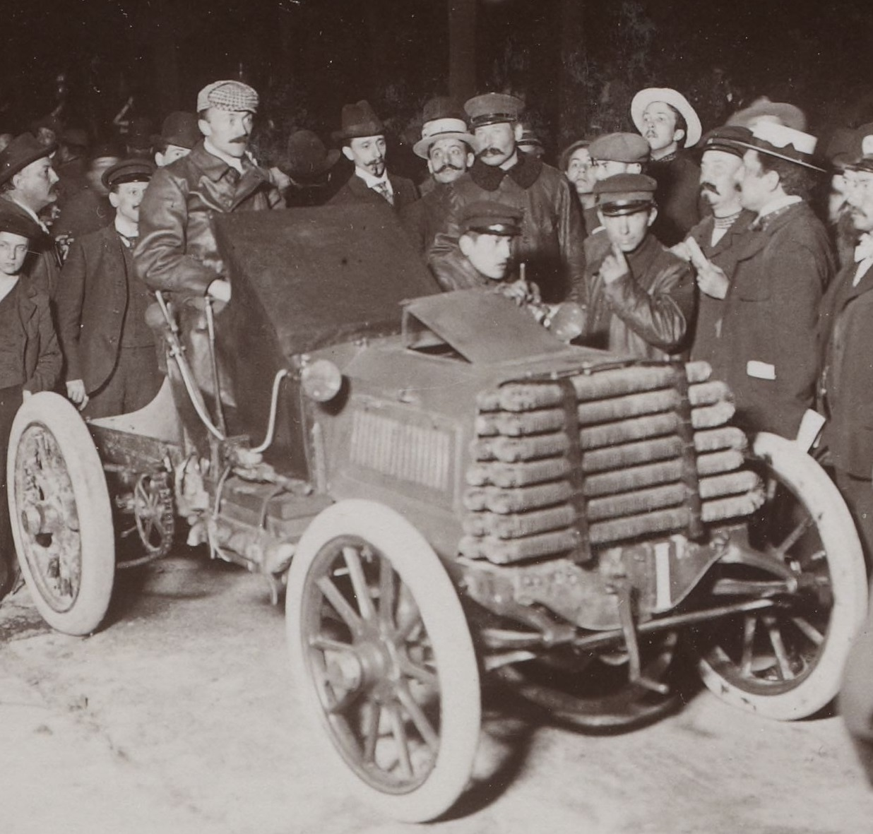 [Collection Jules Beau. Photographie sportive] : T. 15. Année 1901 / Jules Beau : F. 37v. Coupe Gordon-Bennet et Paris - Bordeaux, 29 mai [1901]